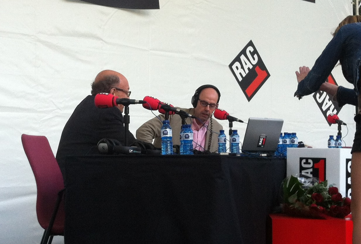 Diada de Sant Jordi 2013